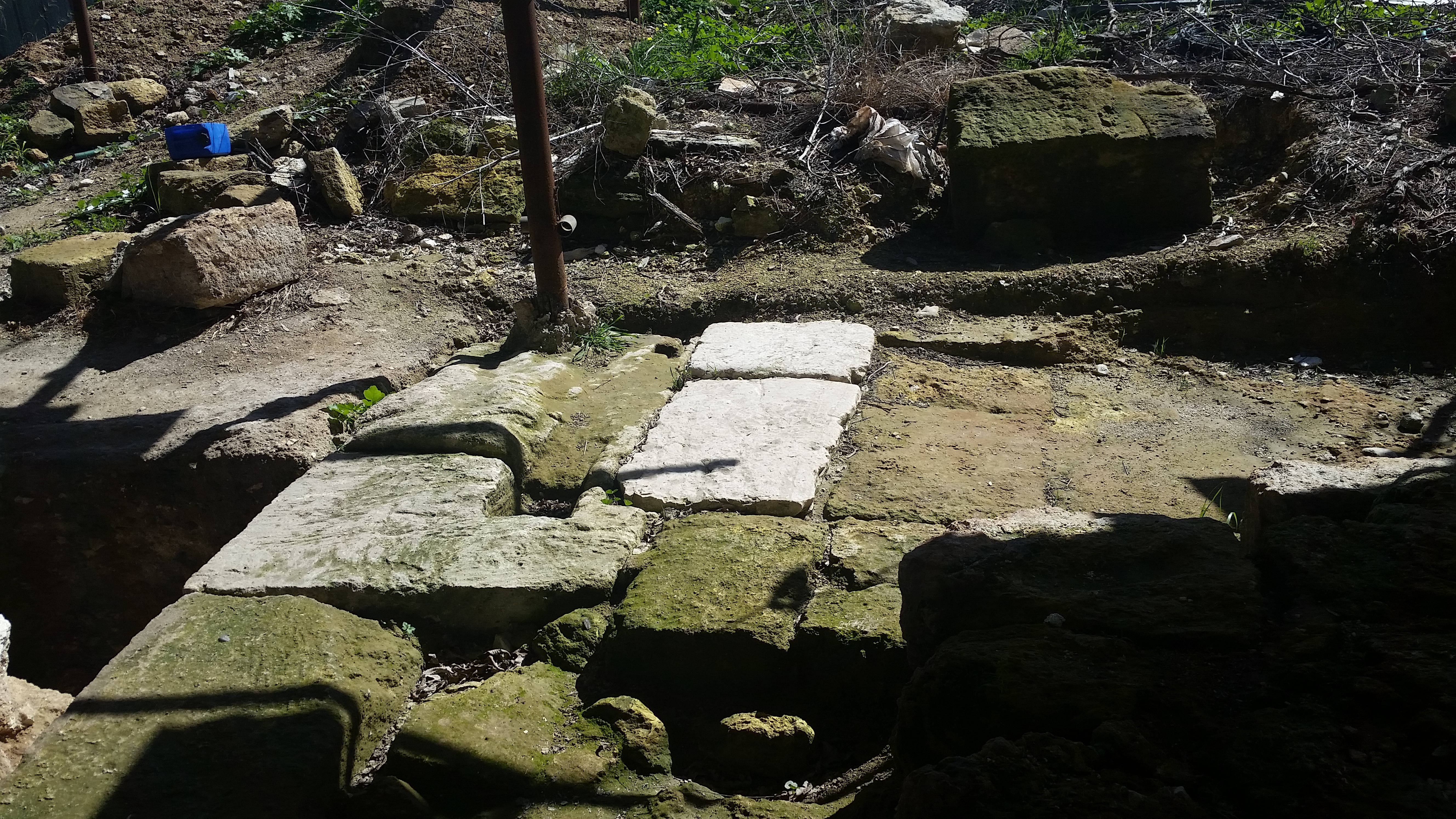 השער שנחשף באתר בית שערים בחצר הבית של טלי זייד